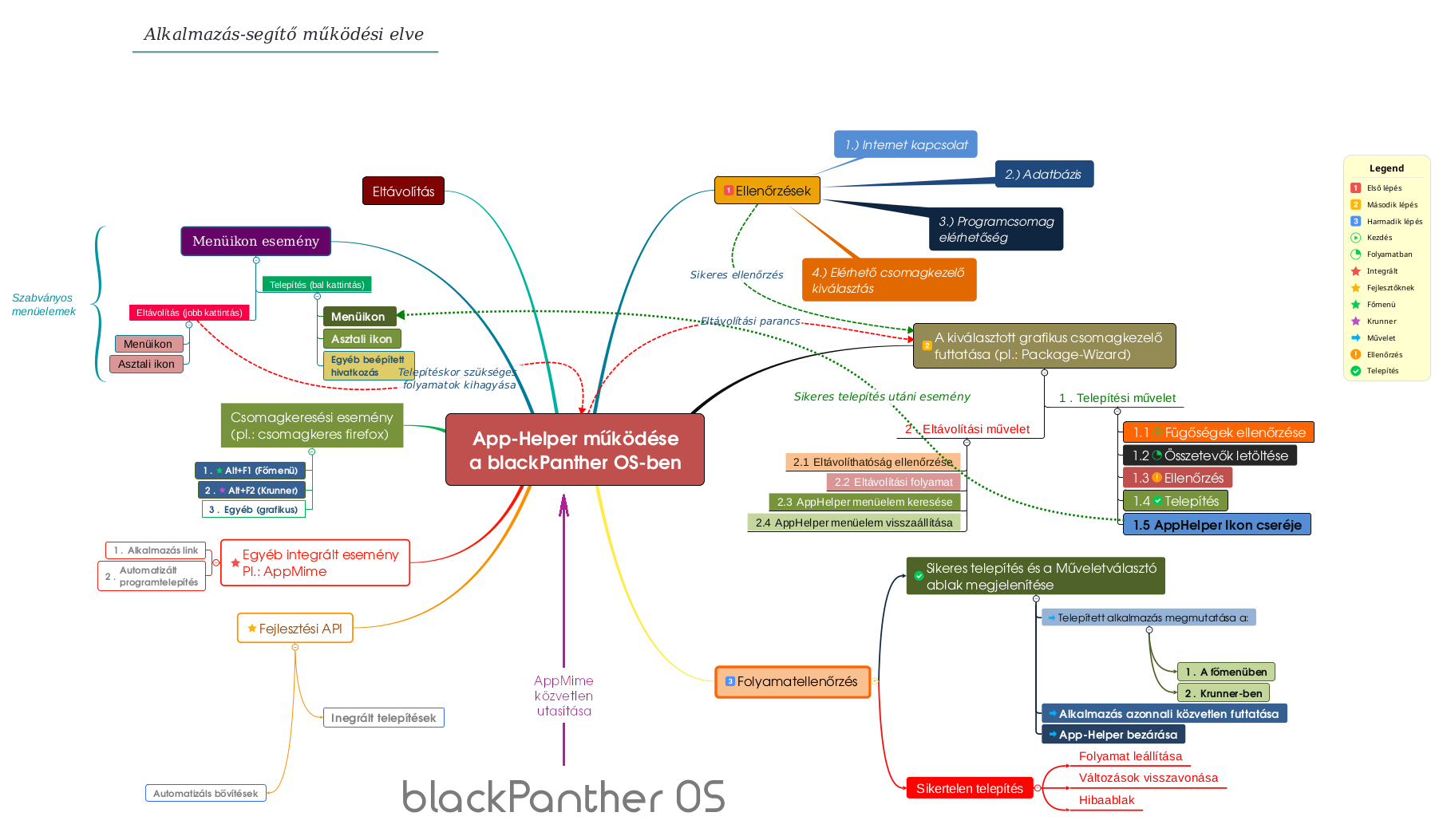 Az Alkalmazás-segítő (AppHelper) működésének elvi vázlata